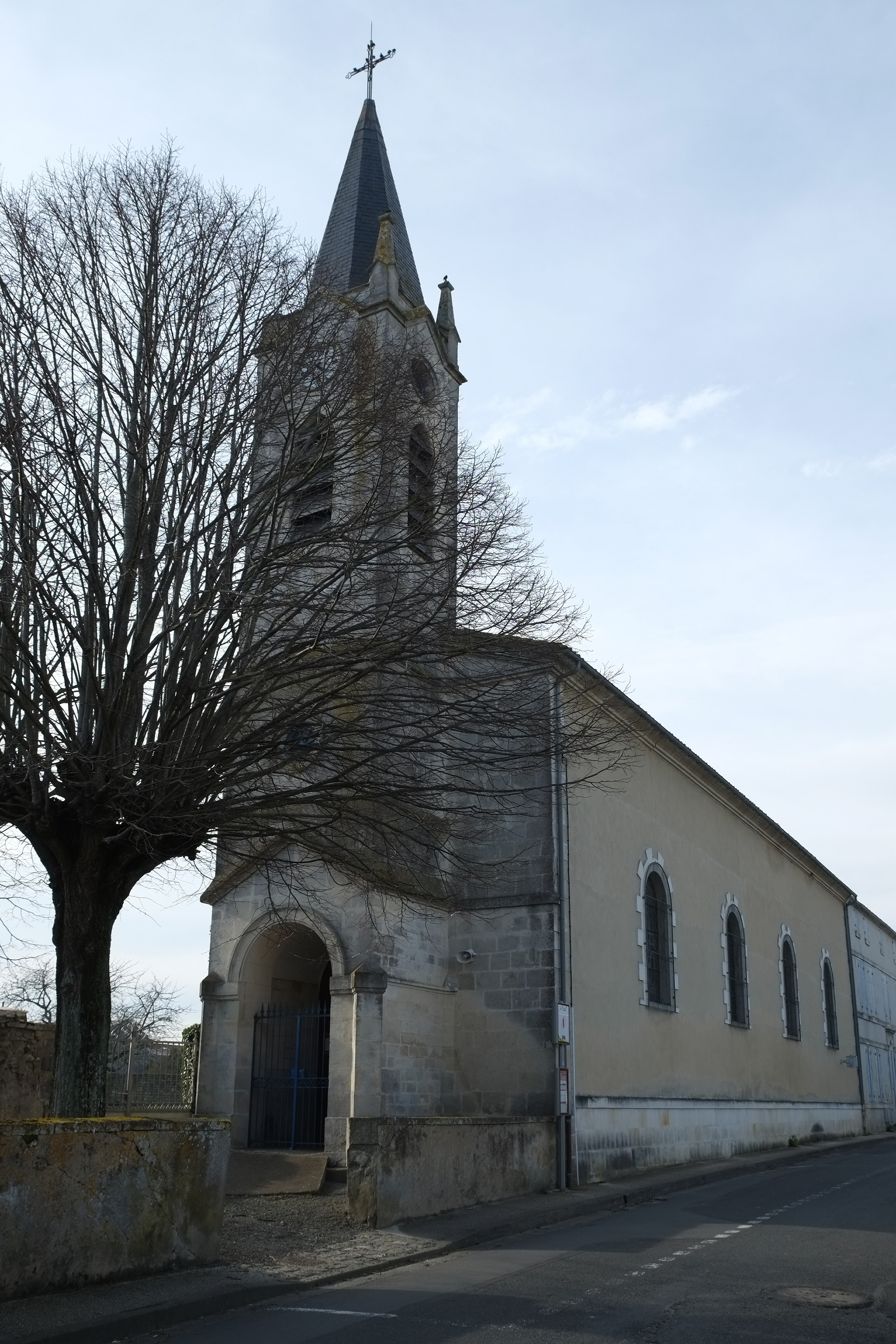 Eglise Saint-Pierre Breuil-Magné Charente Maritime France